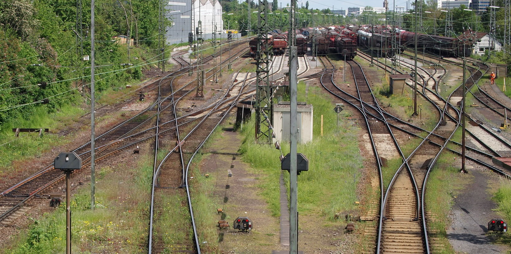 Gleisverbindungen am Ablaufberg im Verschiebebahnhof Kornwestheim